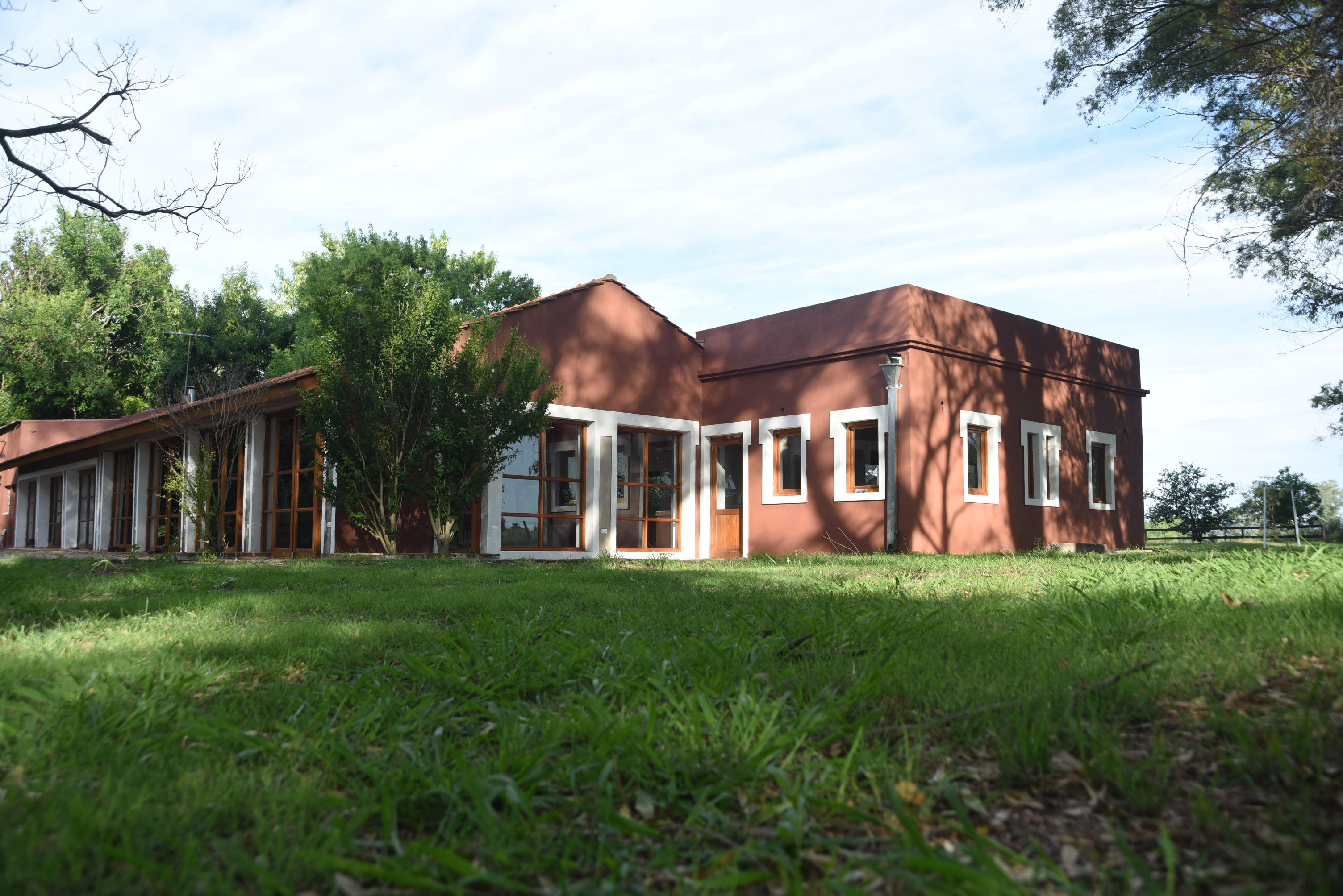 El Cencerro Estancia